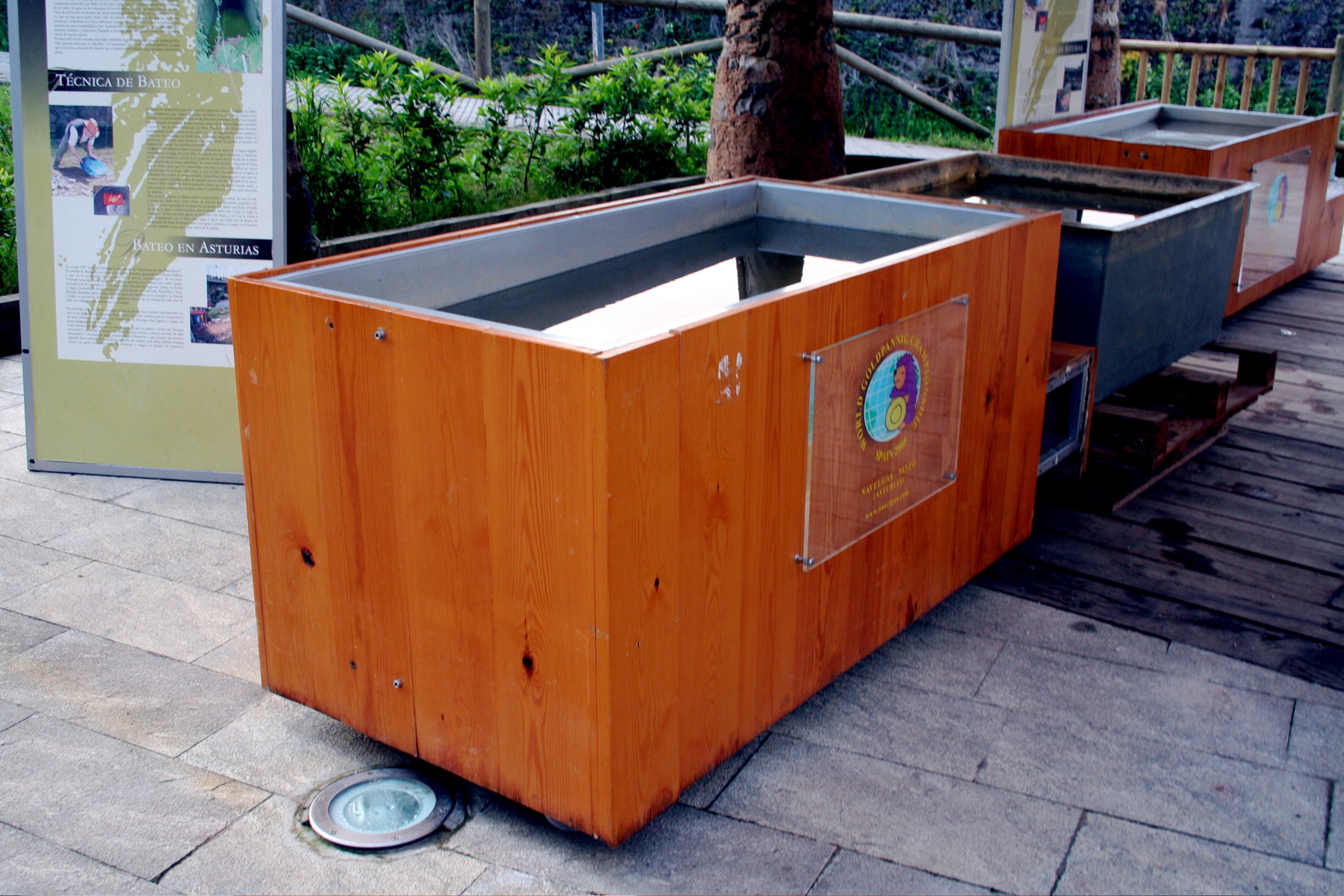 Navelgas